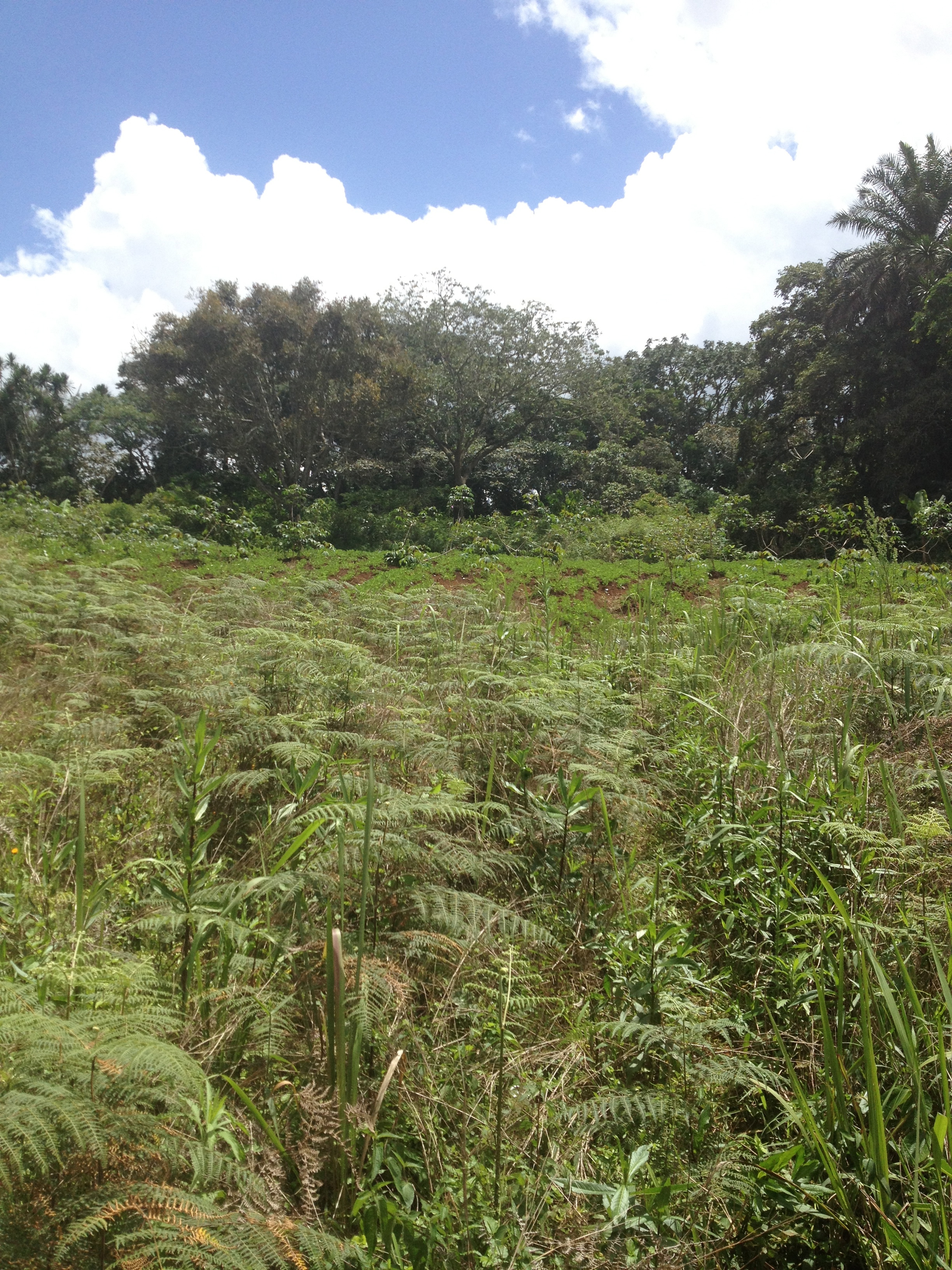 Bamena Vue